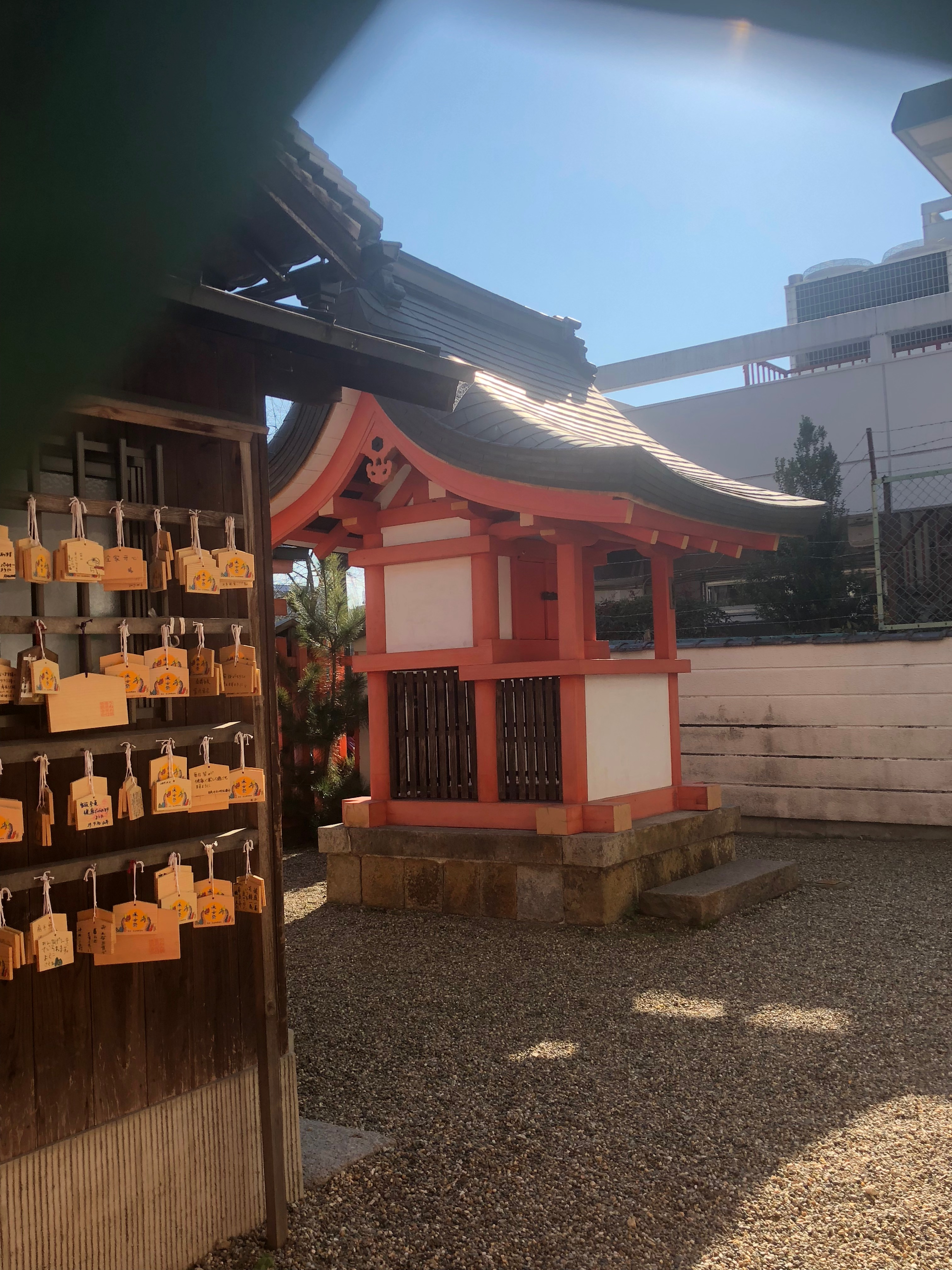 采女神社 奈良県奈良市樽井町 本殿